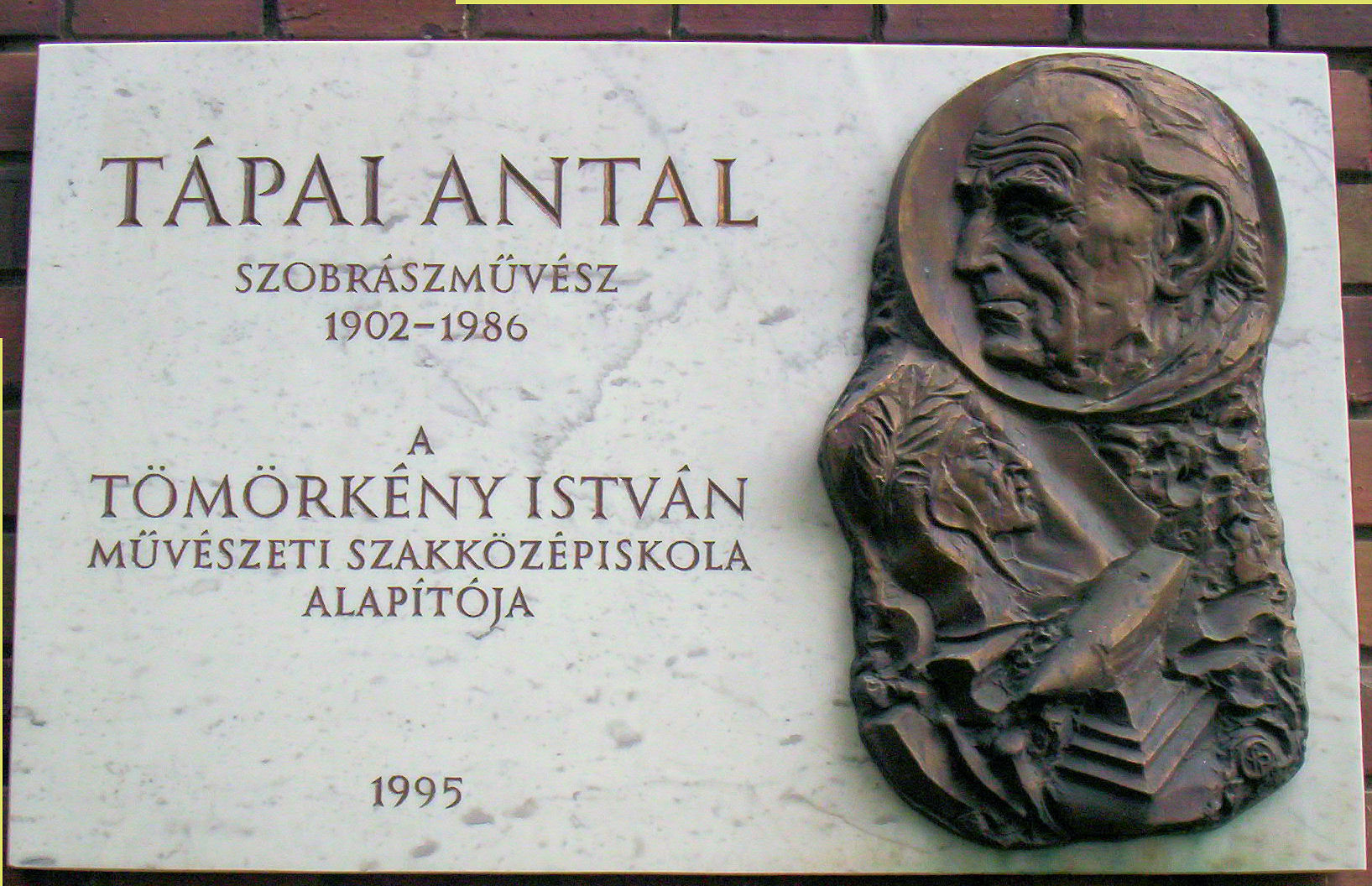 Tápai Antal szobrászművész emléktáblája Szegeden